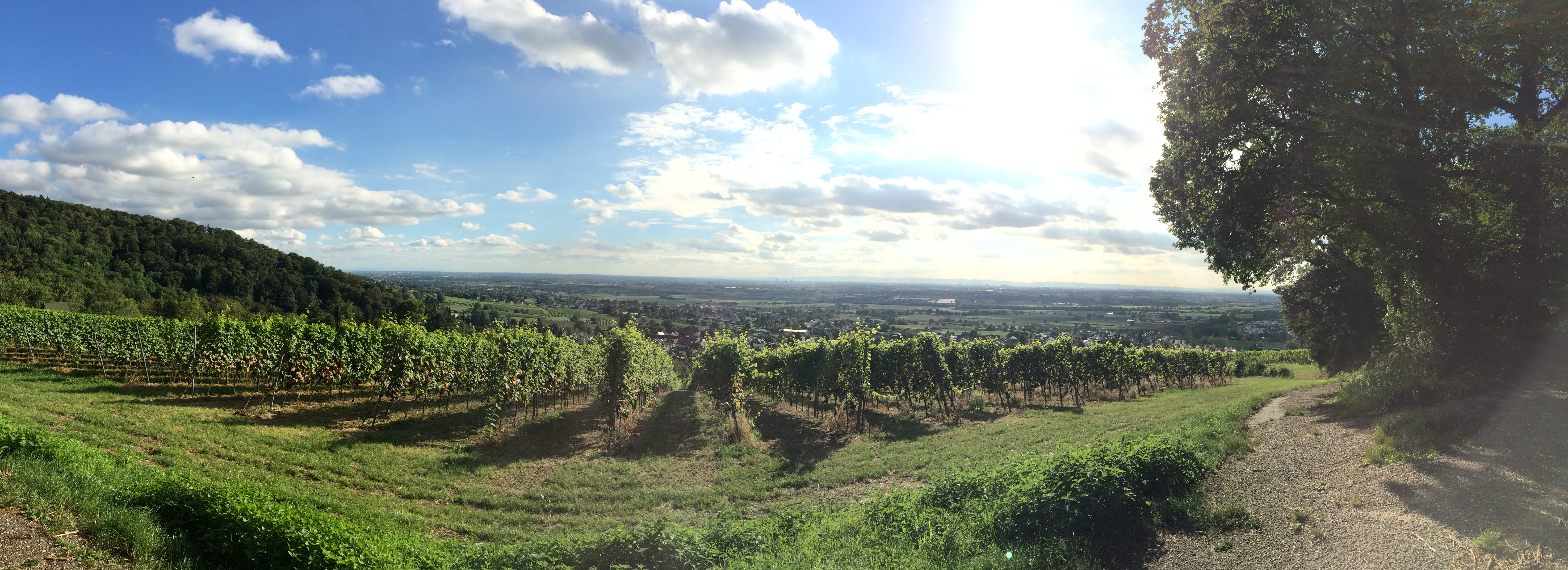 Panoramaaufnahme mit Blickrichtung Westen